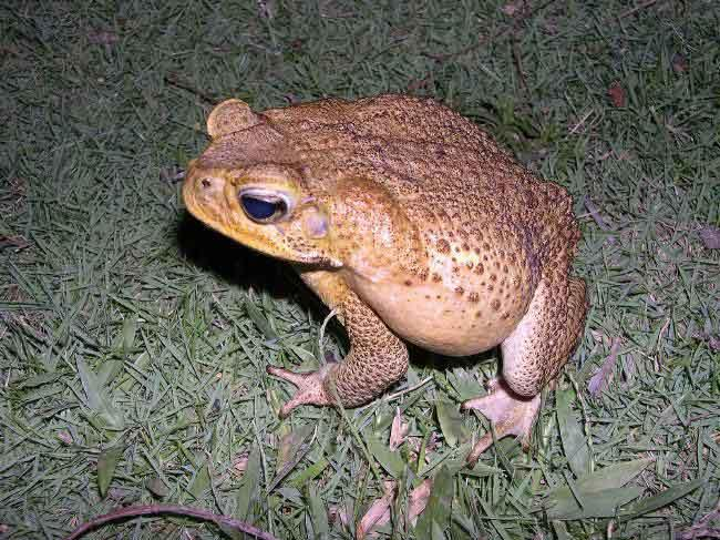 Bufo marinus